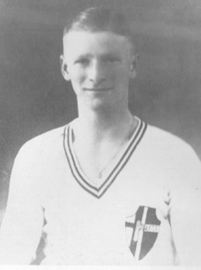 Il calciatore italiano Mario Perazzolo Licensing Categoria:Immagini di Mario Perazzolo